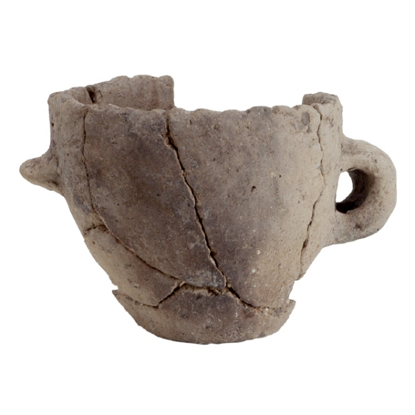 Boccale con orlo arrotondato, decorato ad impressioni digitali e ad unghiate, corpo troncoconico, a parete leggermente convessa, fondo piatto; ansa a nastro verticale, ad orecchio, impostata 18 mm. sotto l'orlo; c'è una presa conica in posizione diametralmente opposta all'ansa.